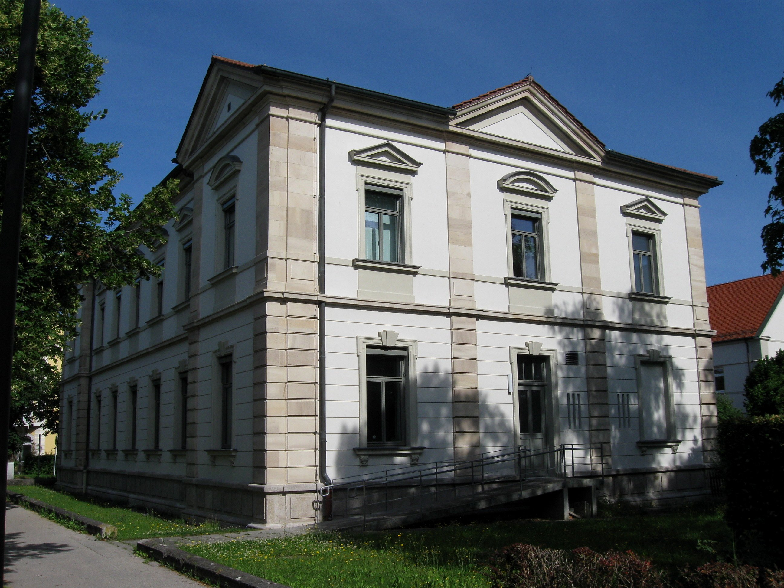 Bahnhofstraße 18; ehem. Amtsgericht, stattlicher, zweigeschossiger Eckbau mit flachem Walmdach, Eck- und Mittelrisaliten, in Formen der Neurenaissance, 1898. D-7-78-173-5